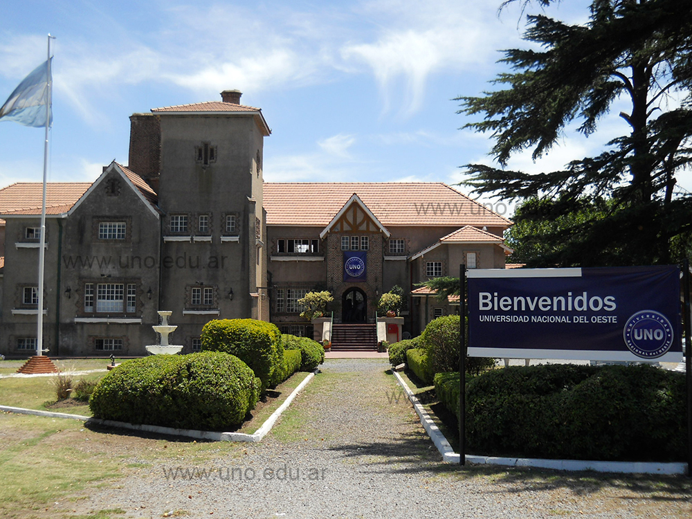 Sede Rectorado UNO